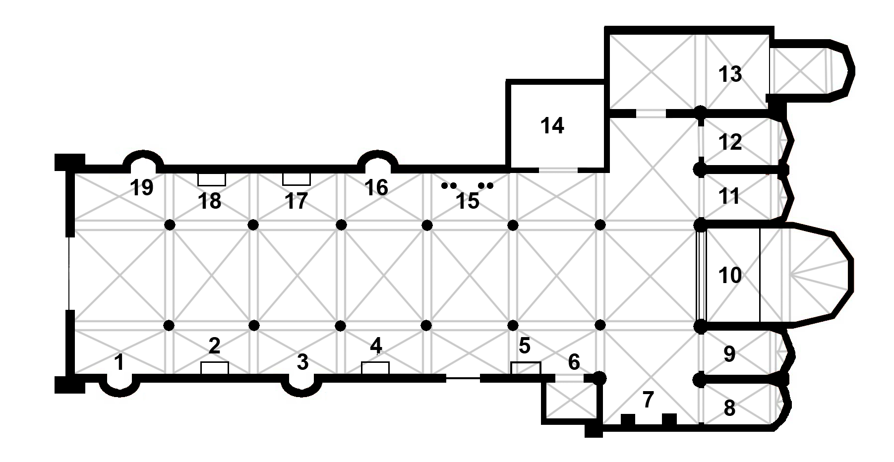 Pianta della chiesa di Santa Anastasia a Verona. 1. Altare Fregoso; 2. Altare Ferreri; 3. Altare dell'Immacolata; 4. Altare Pindemonte; 5. Altare Santa Rosa di Lima; 6. Cappella Crocifisso; 7. Altare Centrago; 8. Cappella Cavalli; 9. Cappella Pellegrini; 10. Presbiterio; 11. Cappella Lavagnoli; 12. Cappella Salerni; 13. Sagrestia e cappella Giusti; 14. Cappella del Rosario; 15. Organo; 16. Cappella Miniscalchi; 17. Altare di san Raimondo di Peñafort; 18. Altare Faella; 19. Altare Baldieri